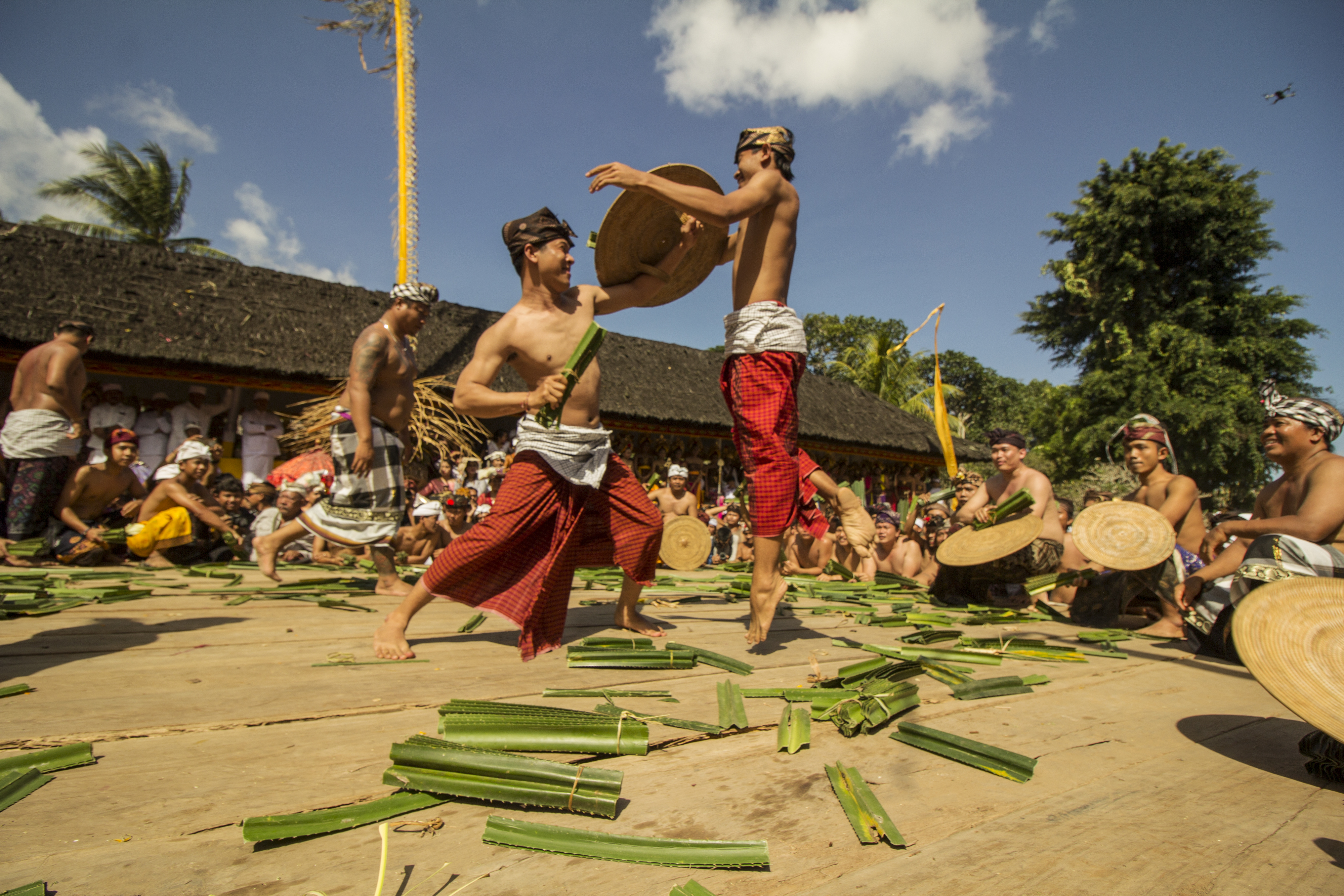 "Perang Pandan" Perang pandan atau Mekare adalah sebuah warisan budaya di Desa Tenganan, Karangasem, Bali. Dimana tradisi ini adalah bertujuan untuk menetralisir kekuatan negatif agar tidak lagi mengganggu manusia.